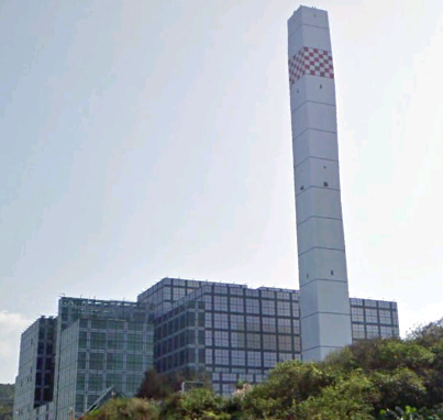 新北市政府環境保護局八里垃圾焚化廠。